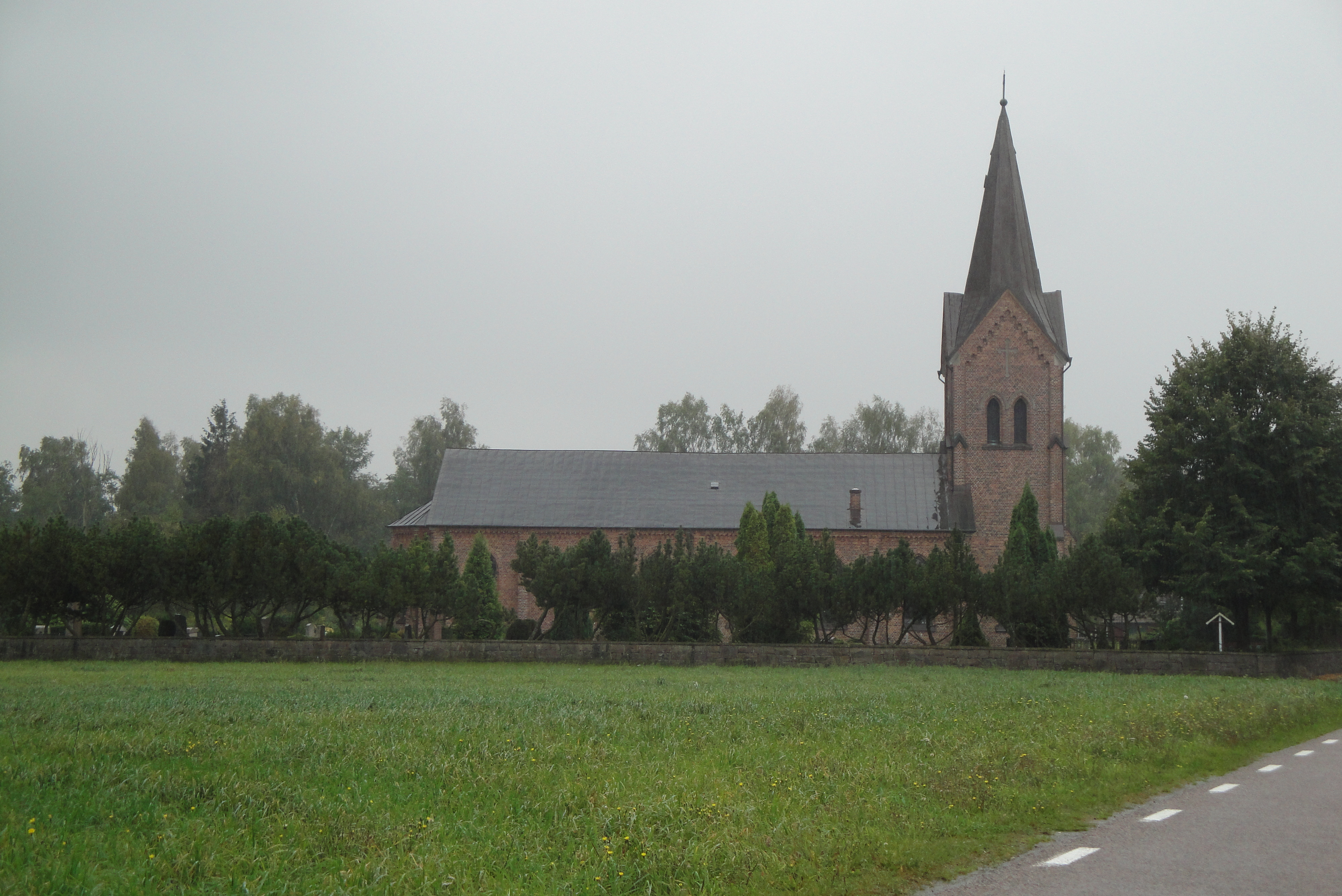 Källna kyrka (Silvåkra 3:18)